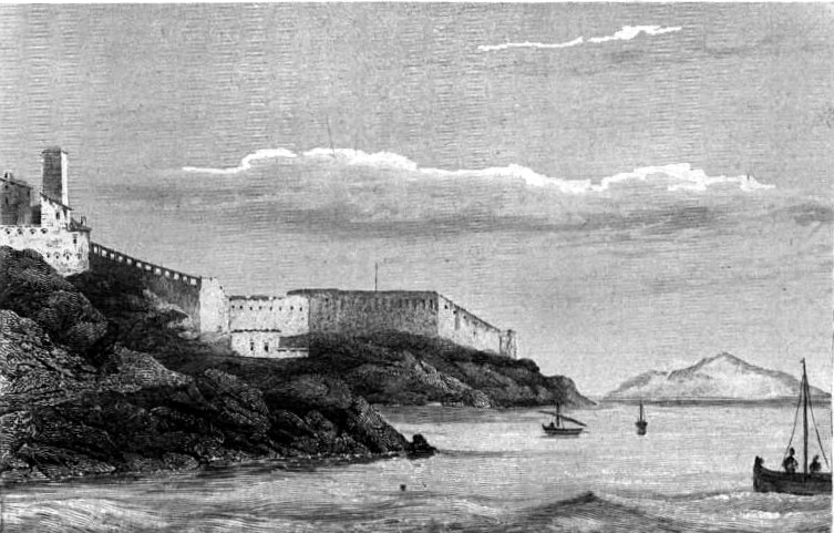 Image en provenance du livre : Eusèbe Girault de Saint-Fargeau, Guide pittoresque du voyageur en France, contenant la statistique et la description complète des quatre-vingt-six départements, orné de 740 vignettes et portraits gravés sur acier, de quatre-vingt-six cartes de départements et d'une grande carte routière de la France, par une Société de gens de lettres, de géographes et d'artistes, Paris, F. Didot frères, 1838, 6 volumes in-8° (BNF : 8-L25- 46). Volume III Didot frères, 1838. Route de Paris à Nice traversant les départements de l'Isère, des Hautes-Alpes, des Basses-Alpes et du Var. auteurs dessins : Rauch (ou autre) auteurs gravures : Skelton fils, Schroeder, Bishop (ou autre)